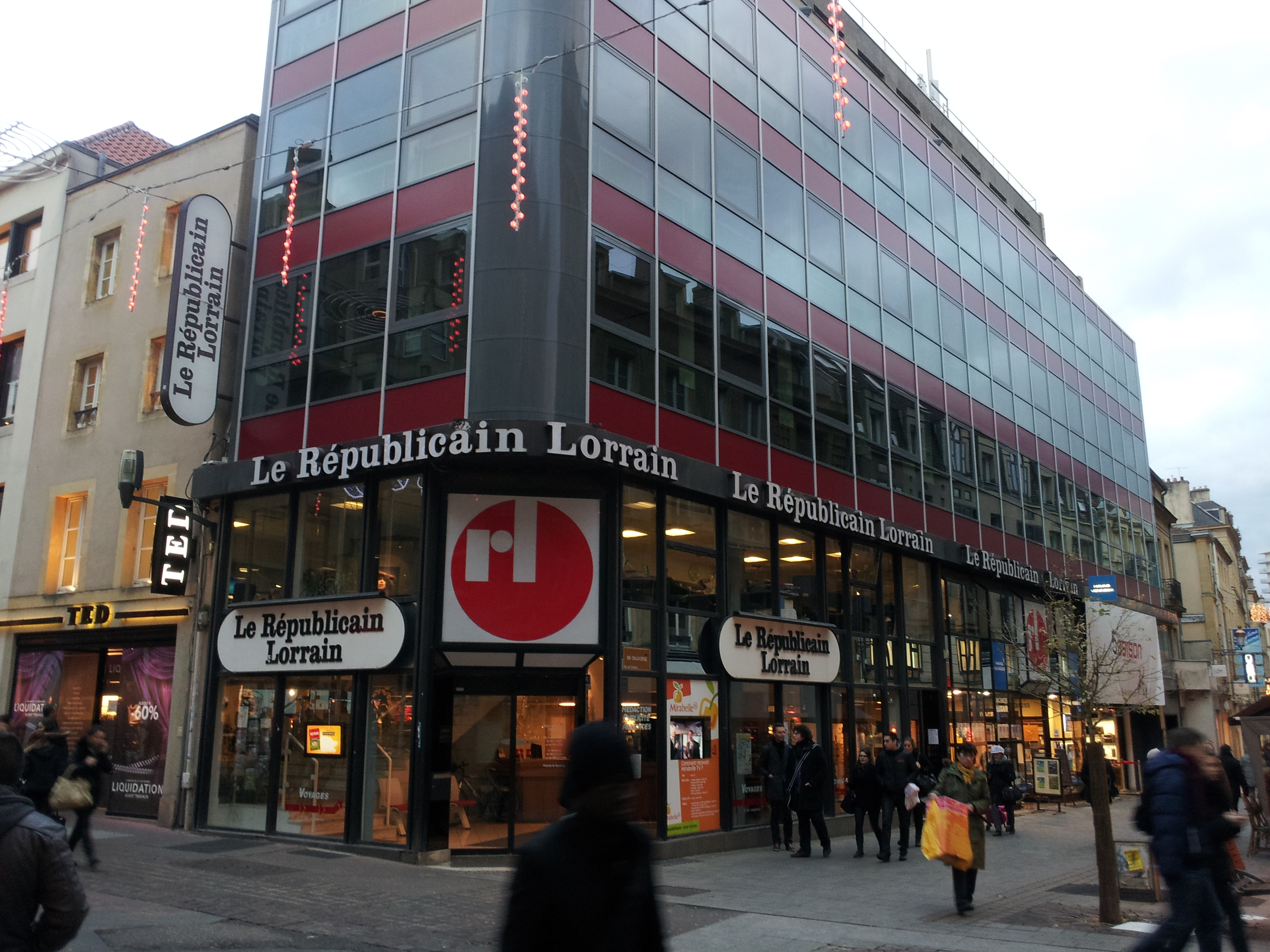 Siège principal du quotidien régional «Le Républicain Lorrain», à Metz